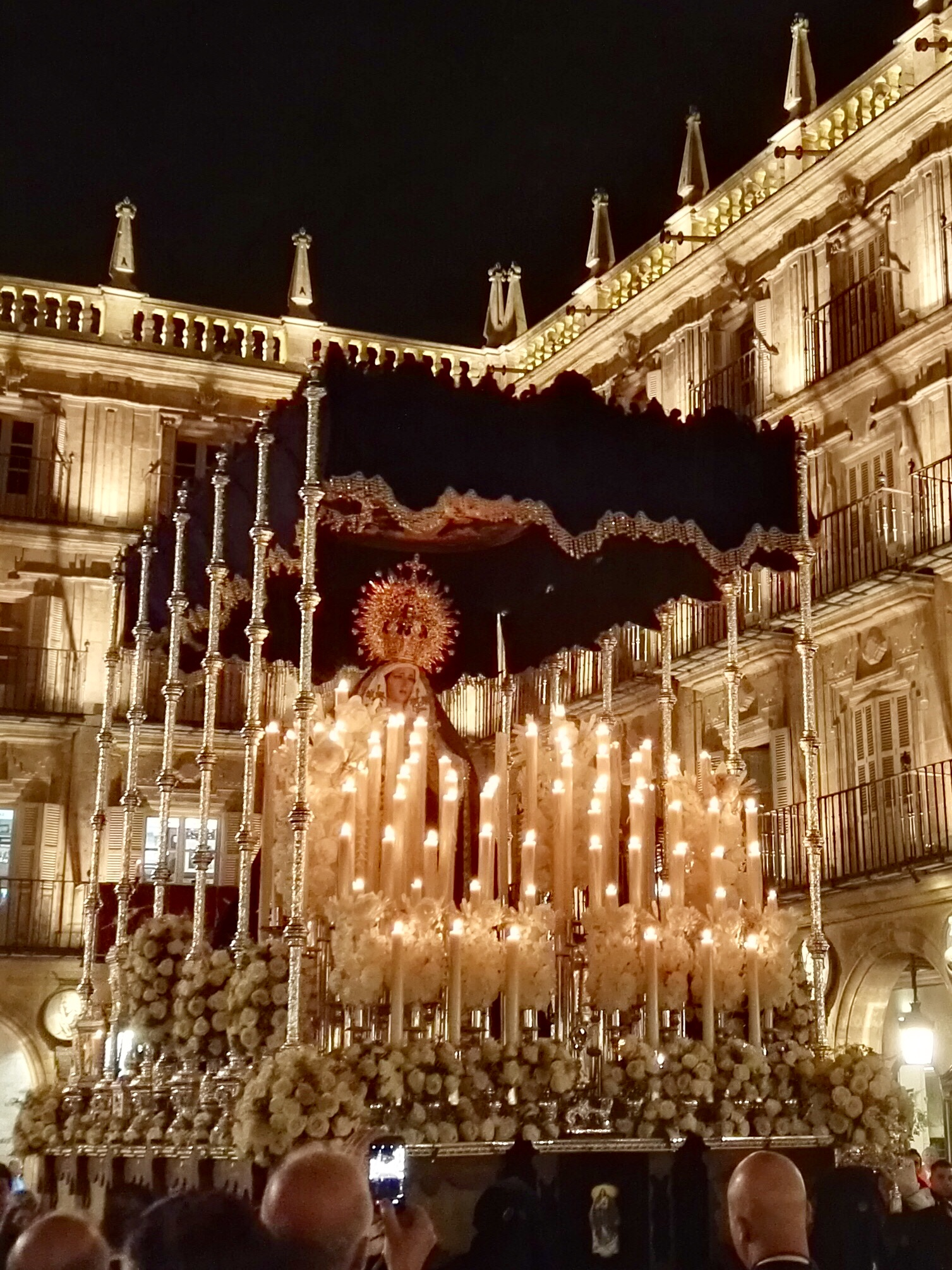 Paso de palio de María Santísima de la Caridad y el Consuelo, de la Hermandad de N. P. Jesús Despojado, en la Plaza Mayor de Salamanca. Domingo de Ramos de 2019. La imagen de María Santísima es obra del imaginero cordobés Francisco Romero Zafra.